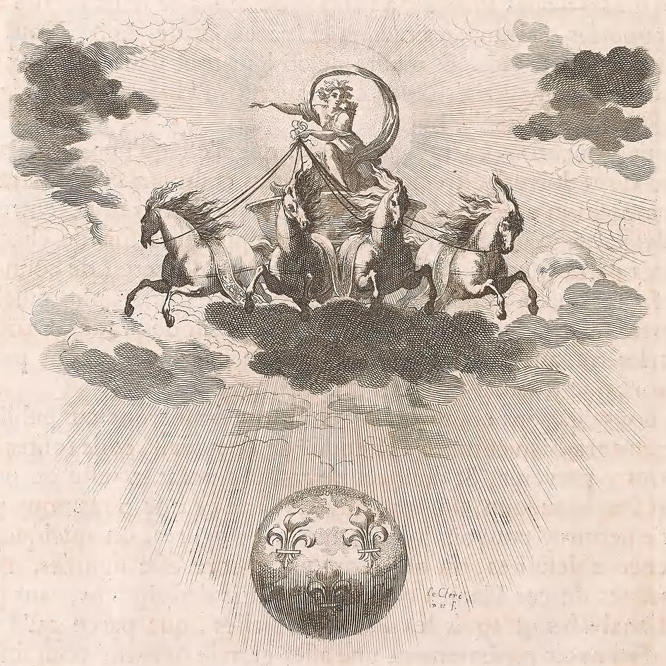 L'Académie éclairant le monde